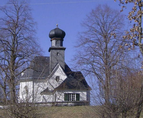 Die evangelische Kirche in Kochel am See